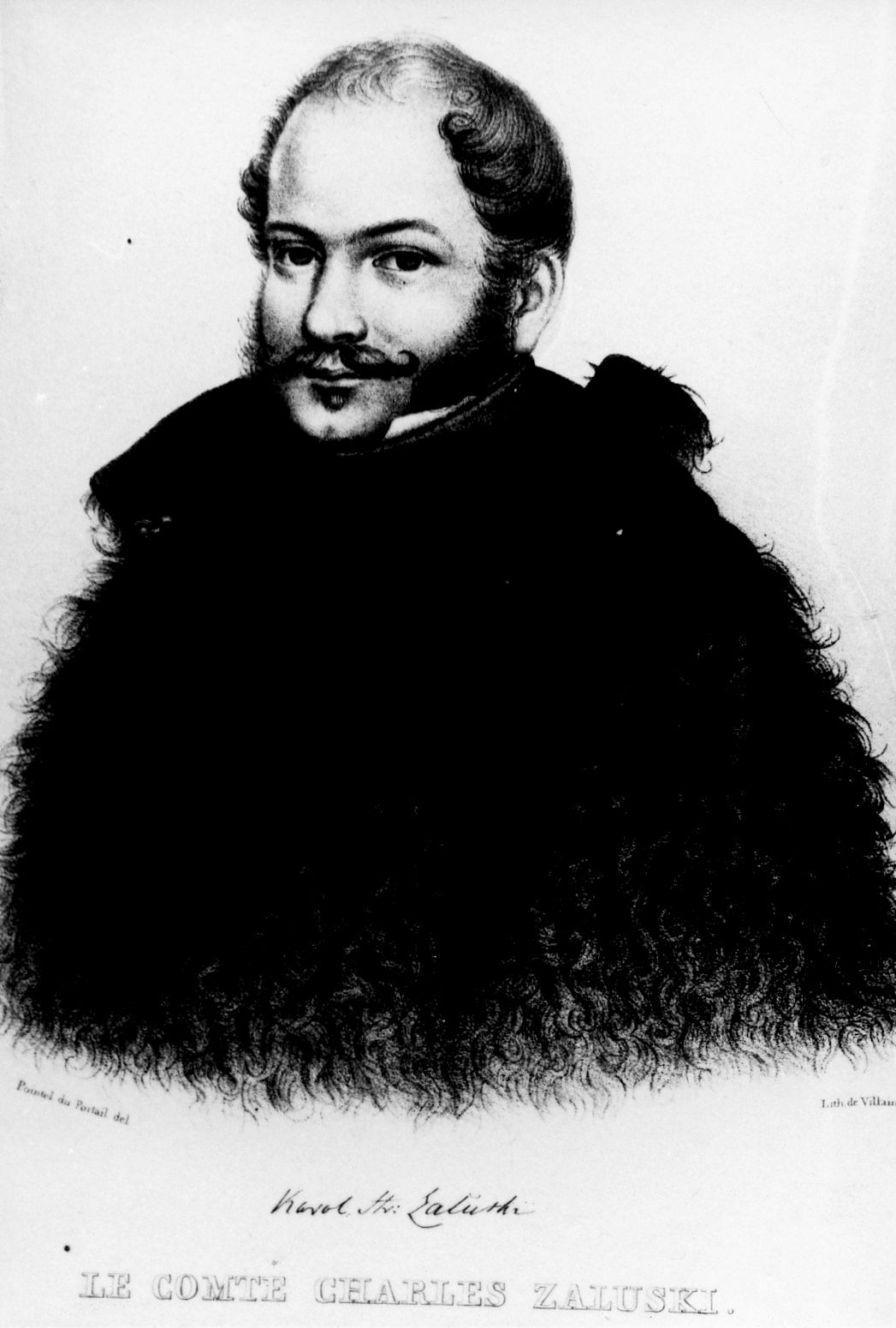 Karol hr. Zaluski 1794-1845